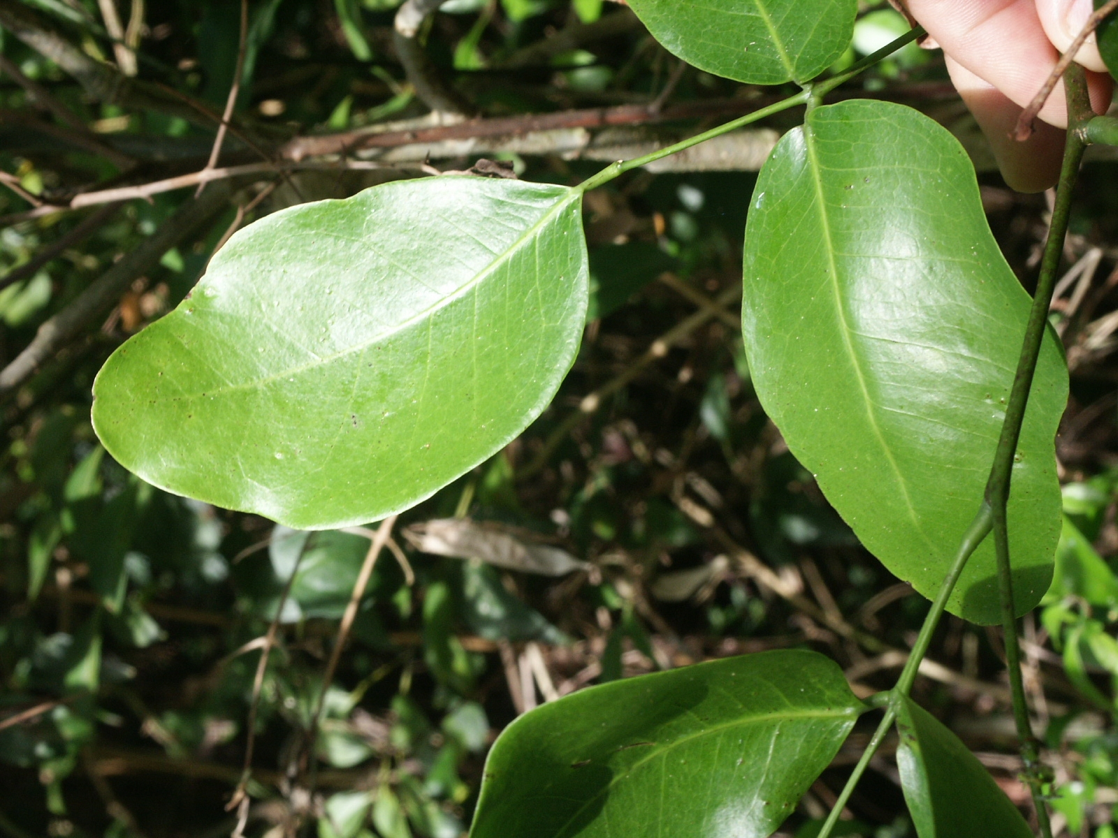 Feuille de Kohu (Intsia bijuga) - Noter les nervures parallèles.